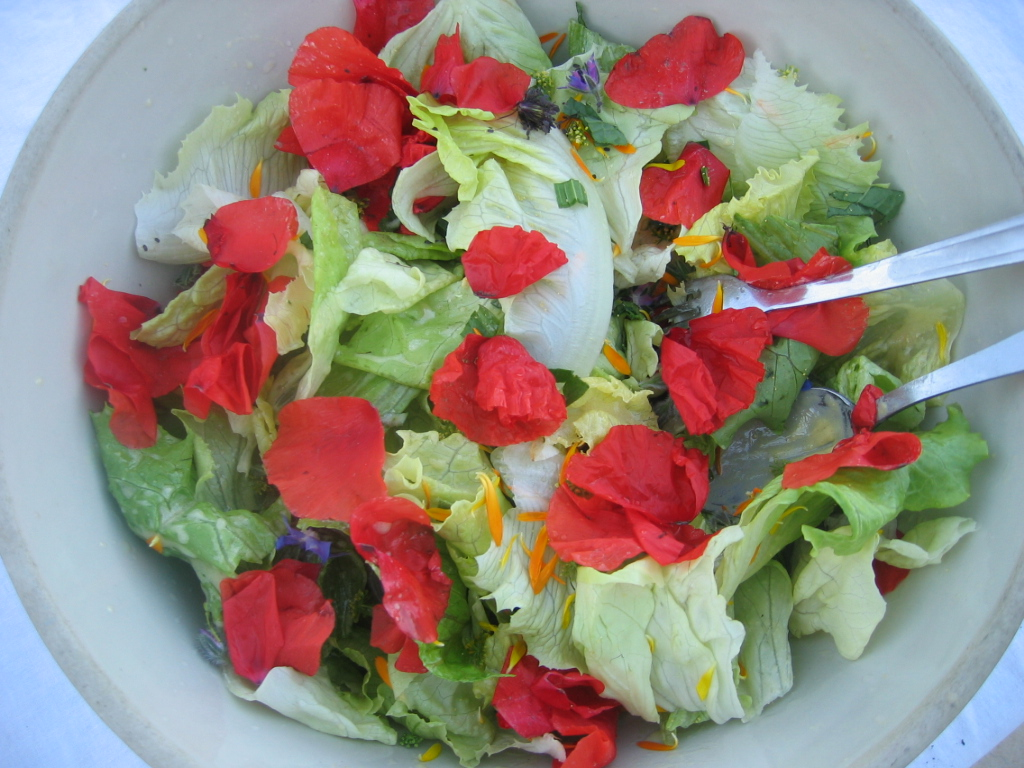 Salade & pétales de coquelicots de Marie-Thérèse Grappe - Éditer par Arnaud 25